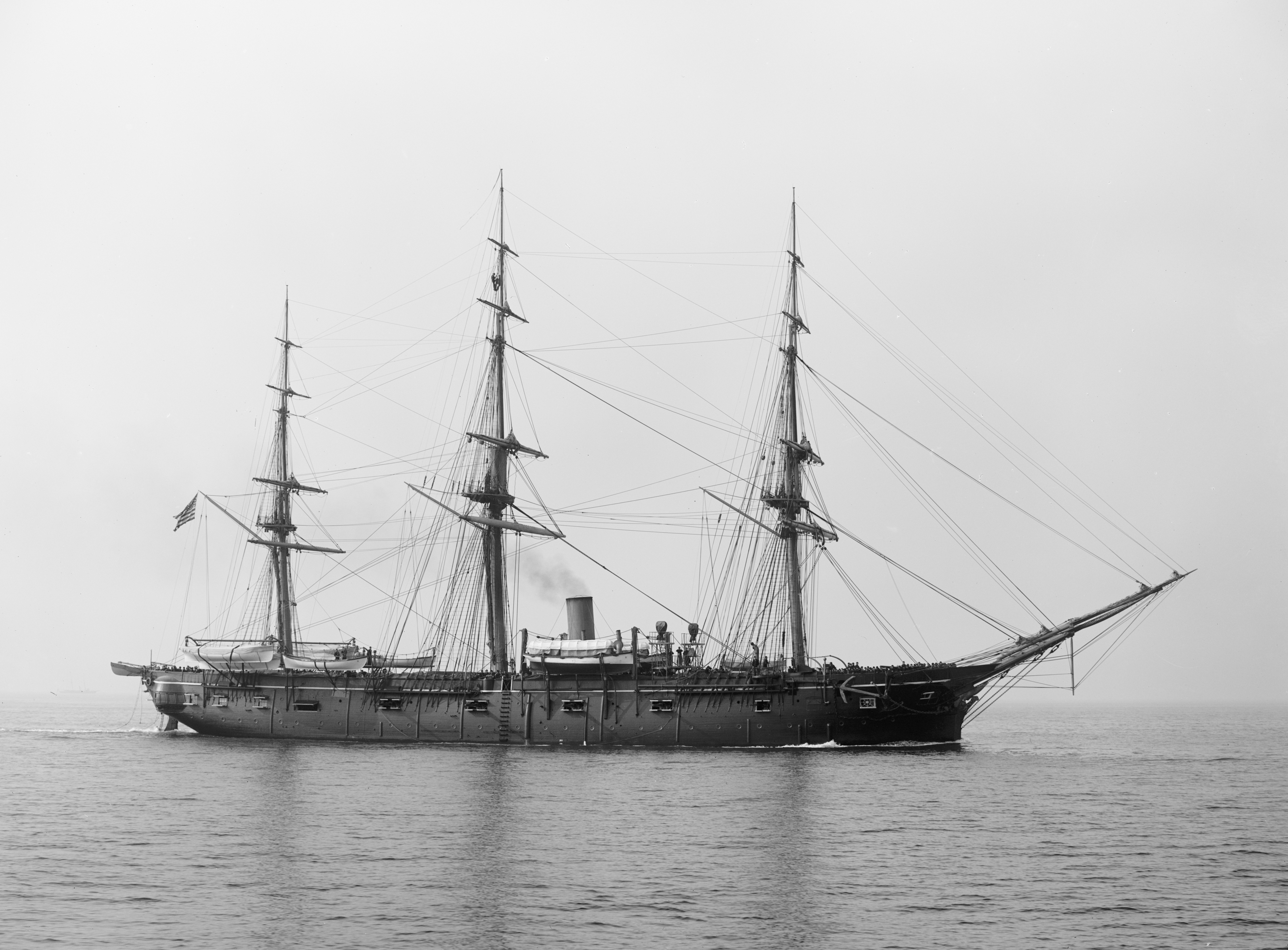 USS Lancaster